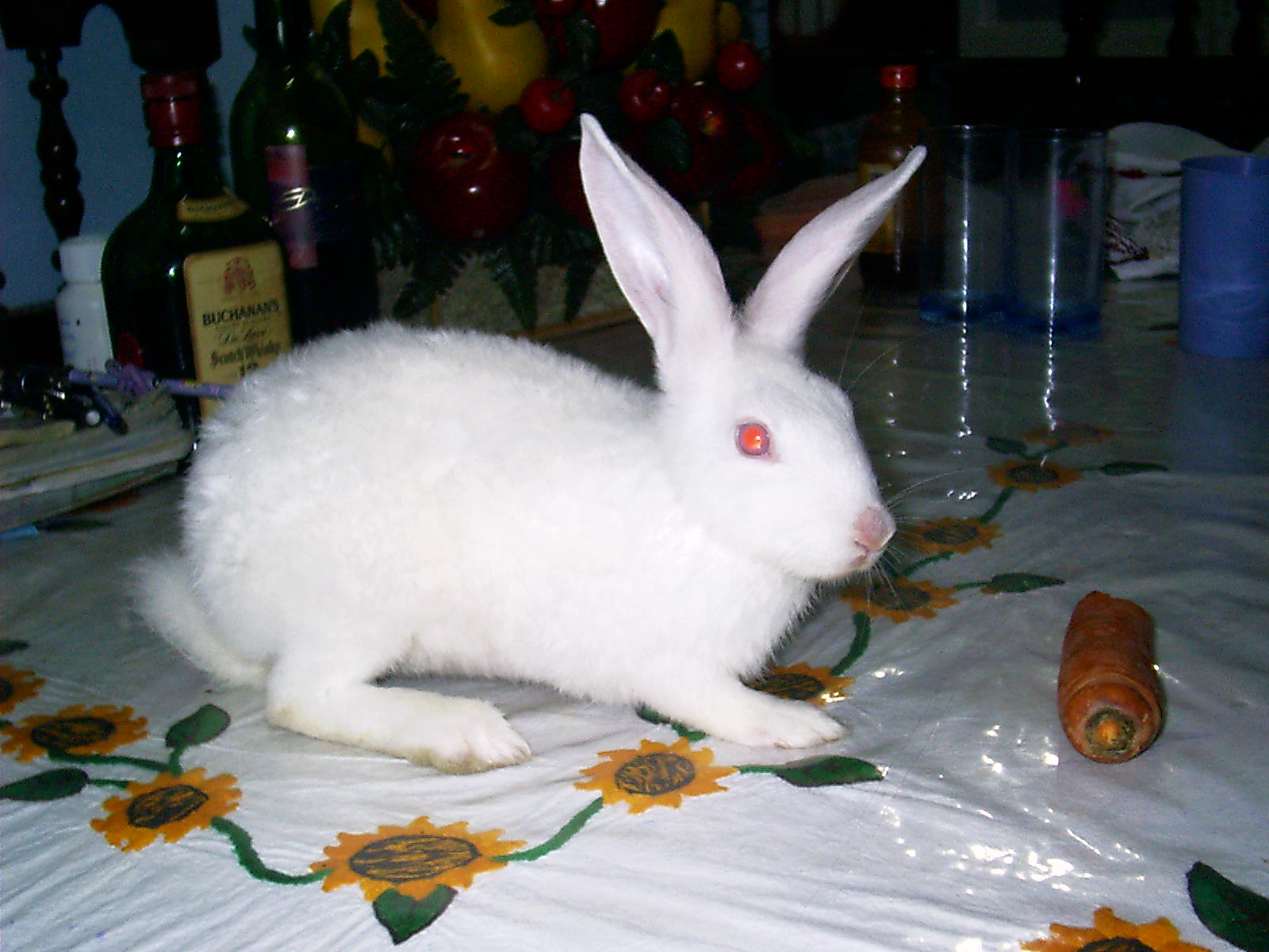 conejo